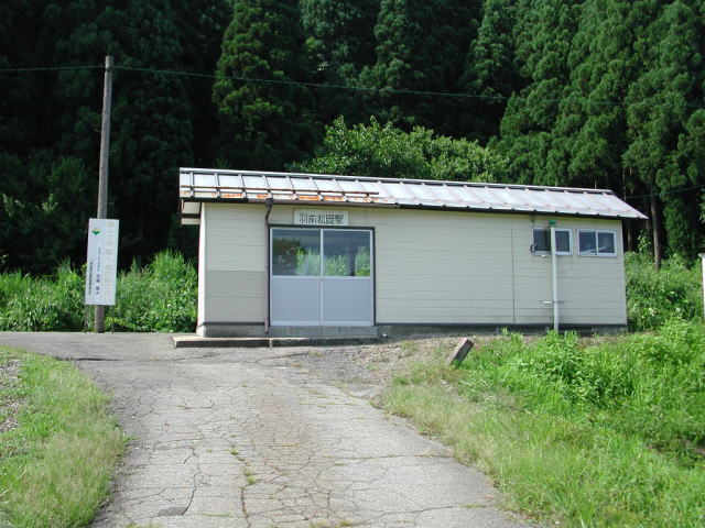 Uzen-Matsuoka Station, Oguni, Yamagata, Japan